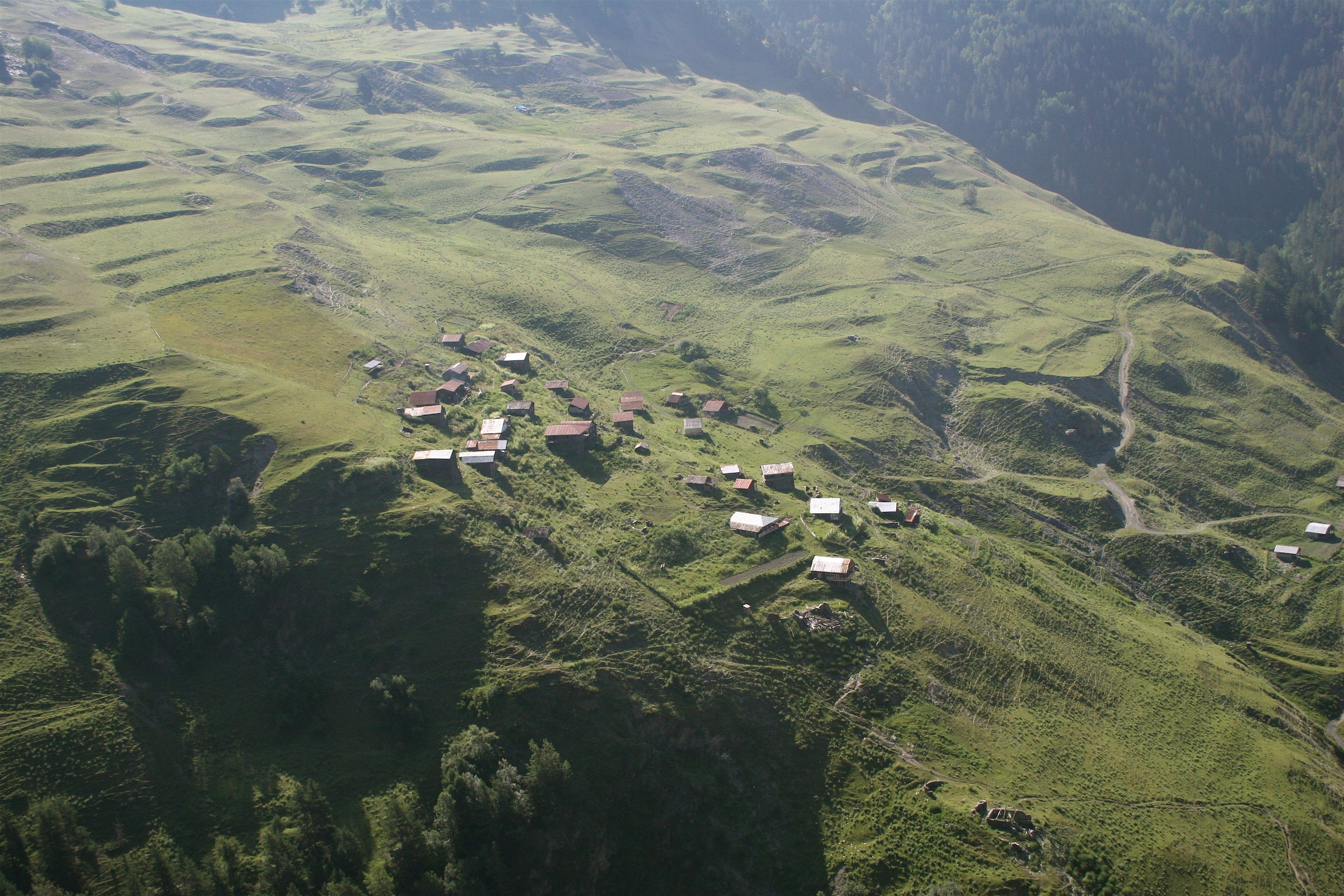 vil. Khakhabo (ხახაბო), Tusheti, Georgia.